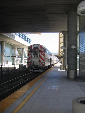 КалТрейн на гара Милбрей (авторска снимка)